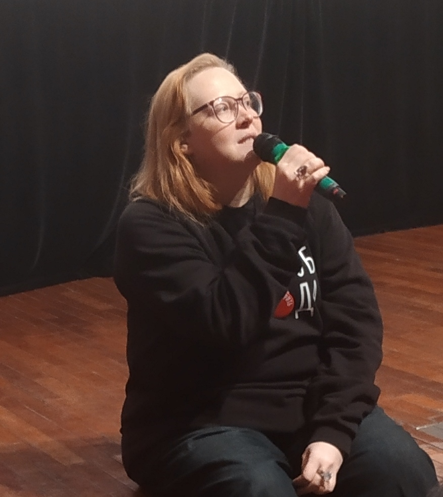 Актриса и режиссёр Юлия Ауг